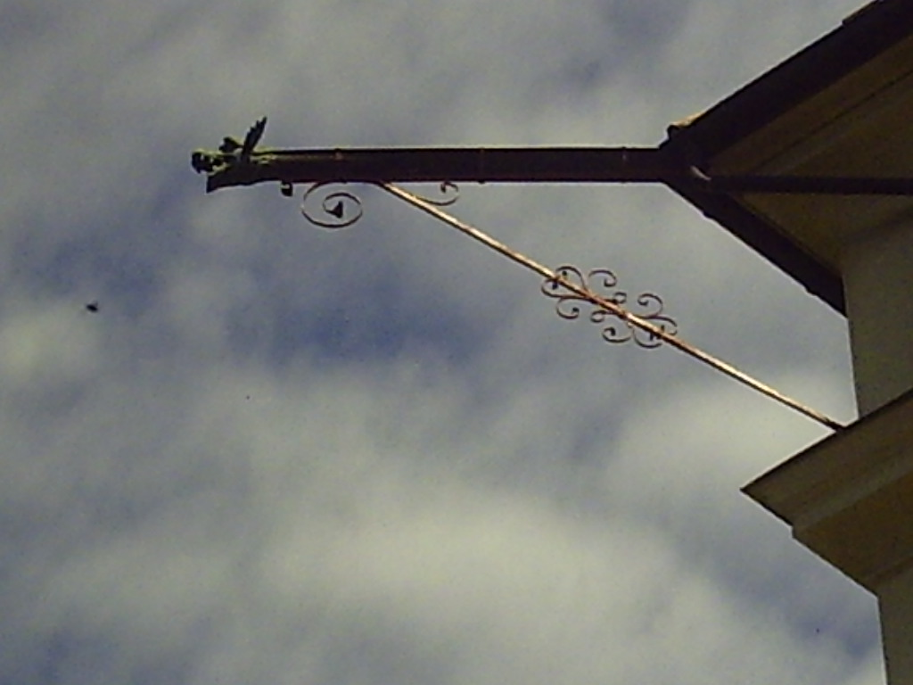 Wasserspeier des Schlosses Hohenburg